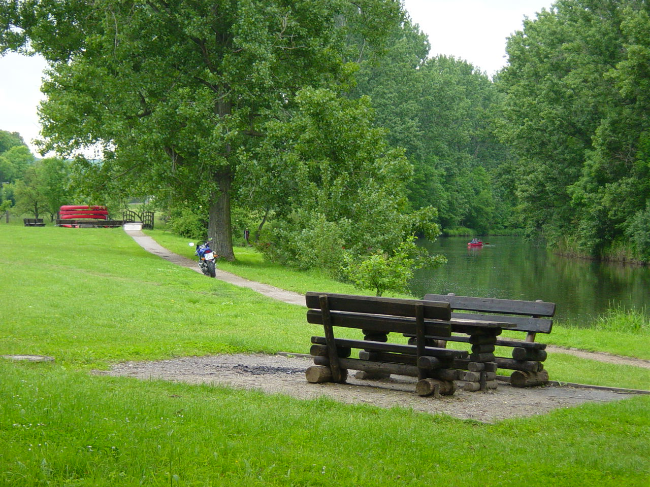 Unstrut, Rastplatz für Kanuwanderer bei Kirchscheidungen